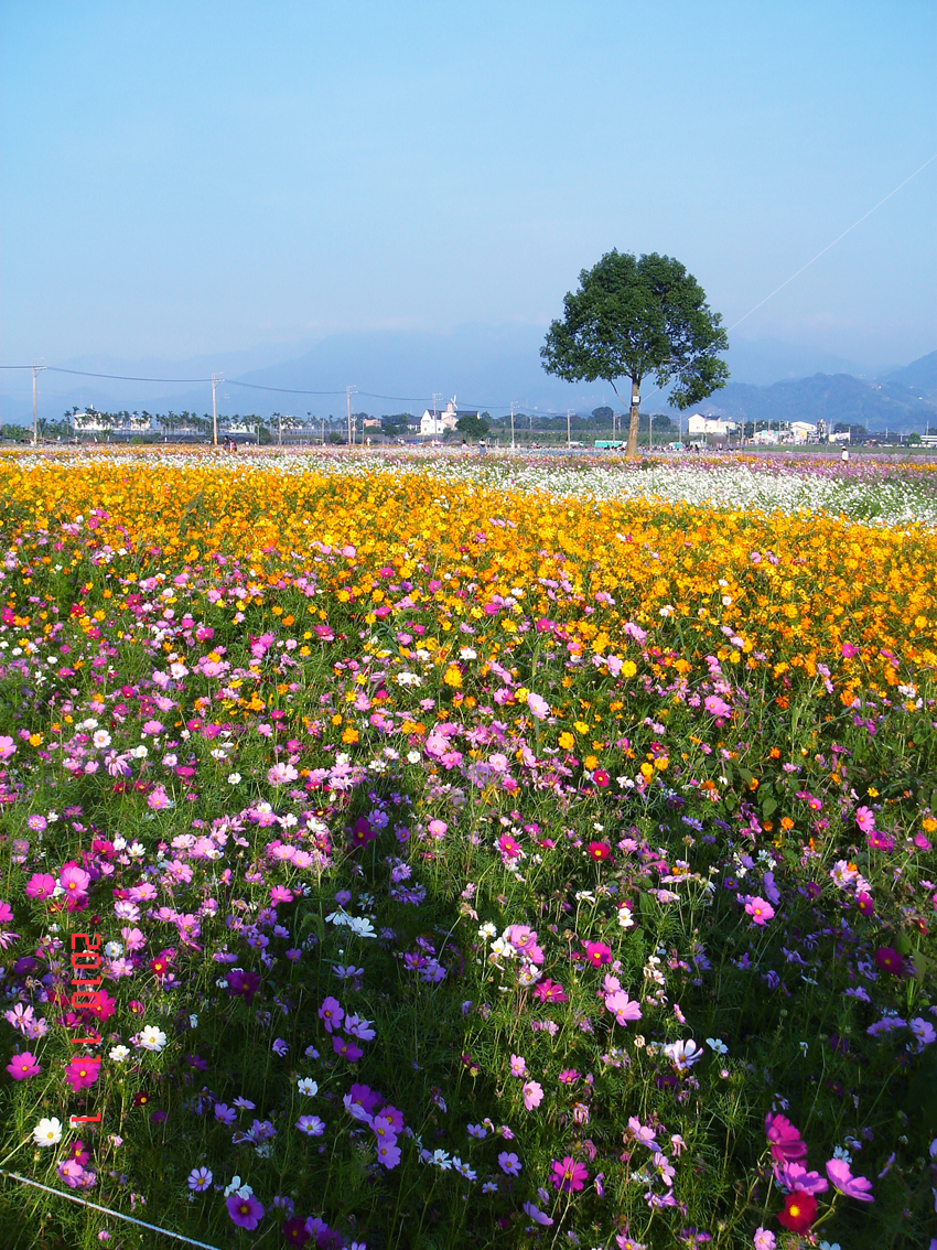 臺中新社花季